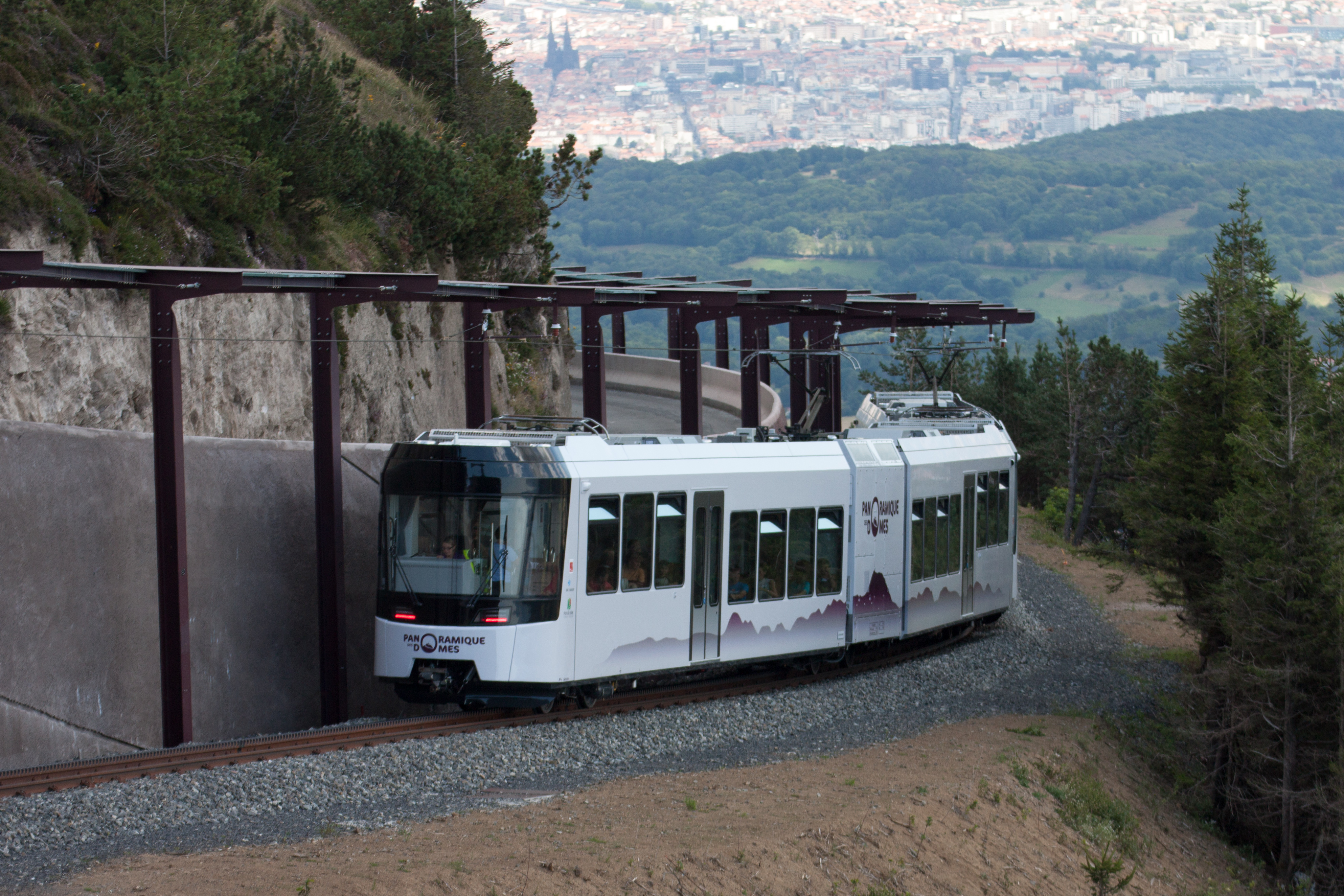 Rame Stadler du Panoramique des Dômes partant de la gare supérieure